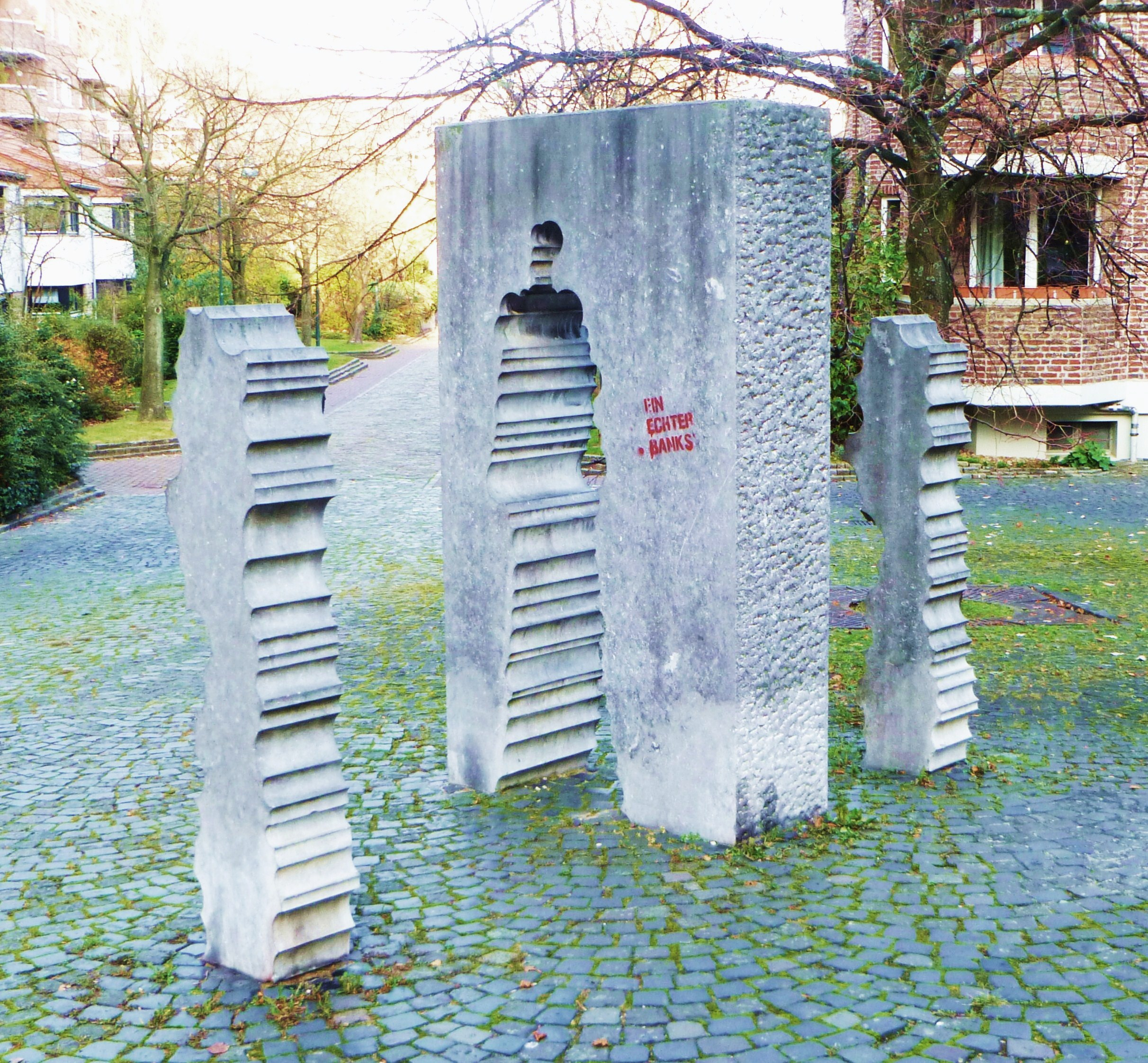 Skulptur "Der Durchbruch", Aachen, Heinz Tobolla, 1985